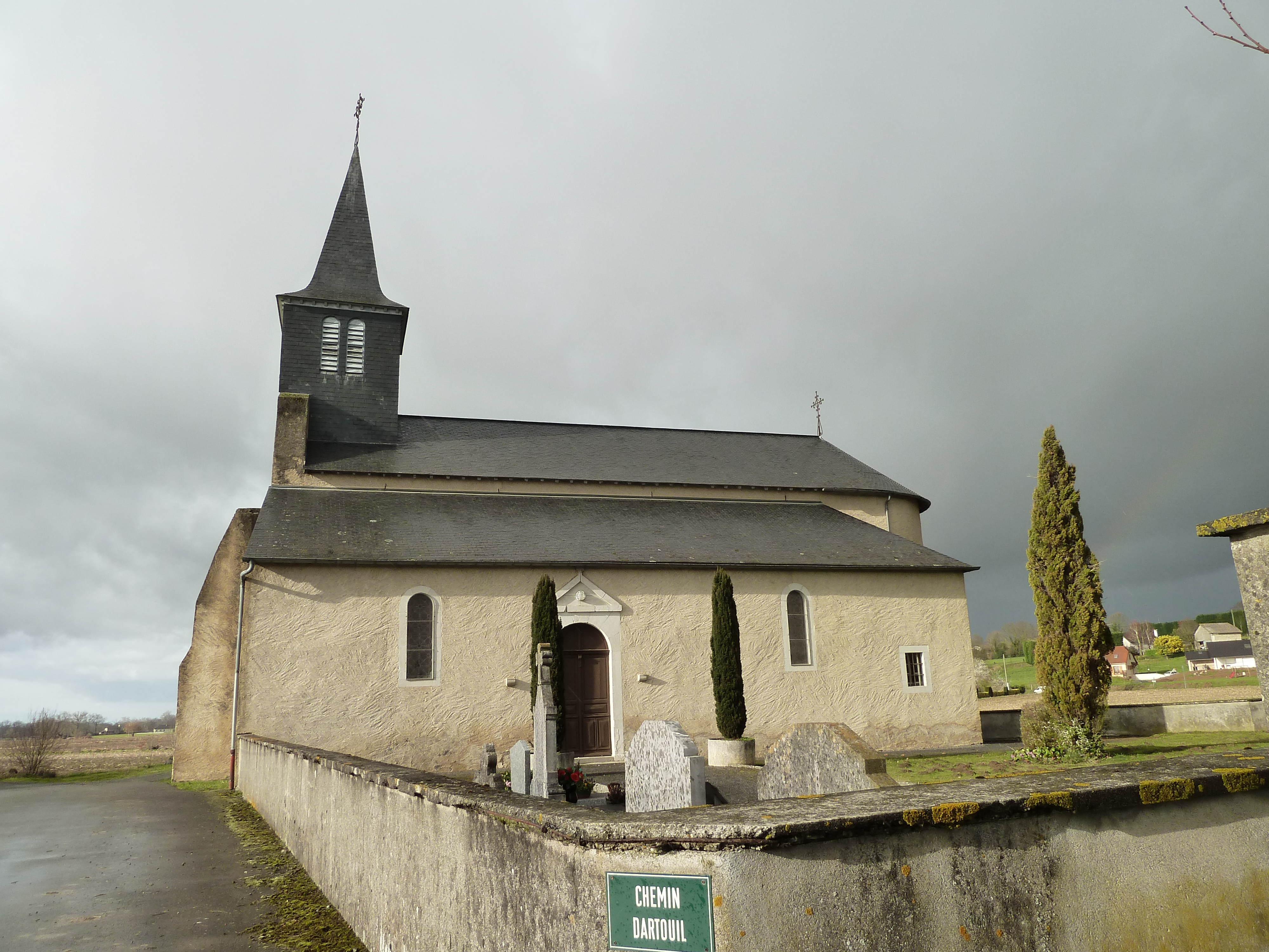 Église d'Arrien (Pyrénées-Atlantiques)